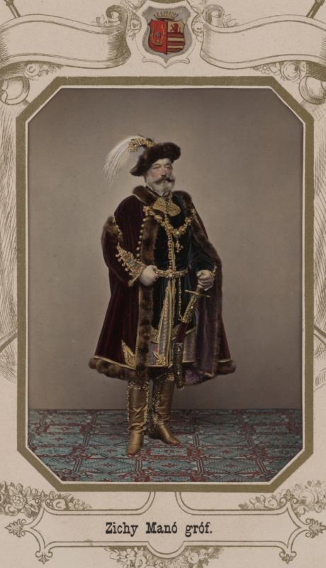 Bildnis in Magnatentracht. In: Bülch, Agoston. Szerett Urunk Fejedelmünk Isö. Ferencz Jósefnek Magyarország Királyáyá és Felséges Asszonyunk Erzsébetnek a Magyar Nemzet Örangyalának Magyarország Királynéjává. (Die Krönung in Ungarn 1867). 1867.